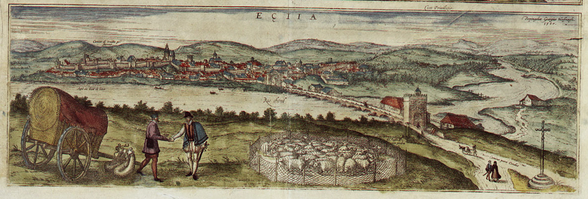 Écija